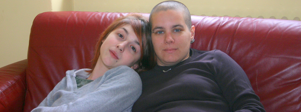 Lesbische Zweisamkeit auf dem Sofa